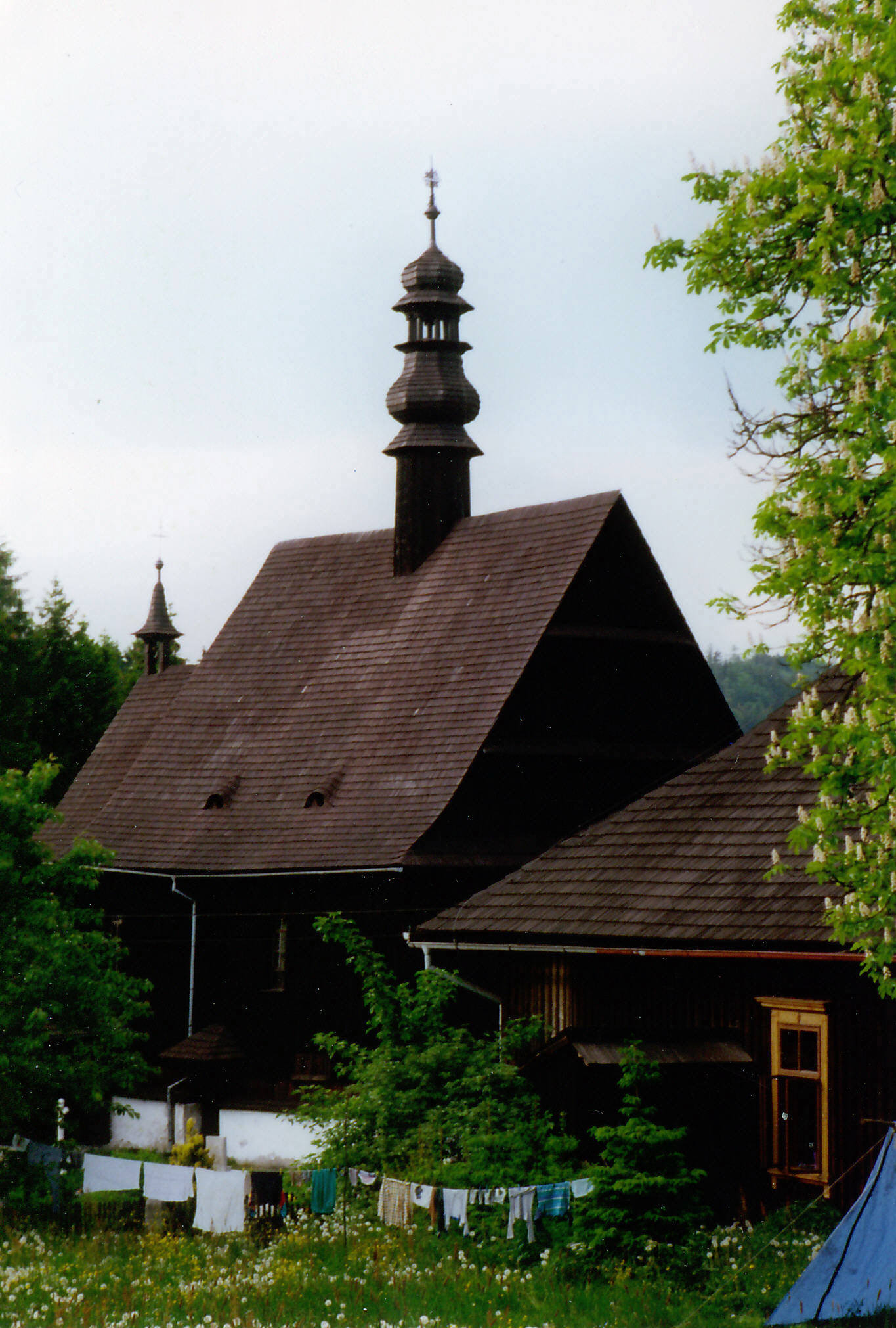 Dřevěný kostel sv. Petra a Pavla v Liberku